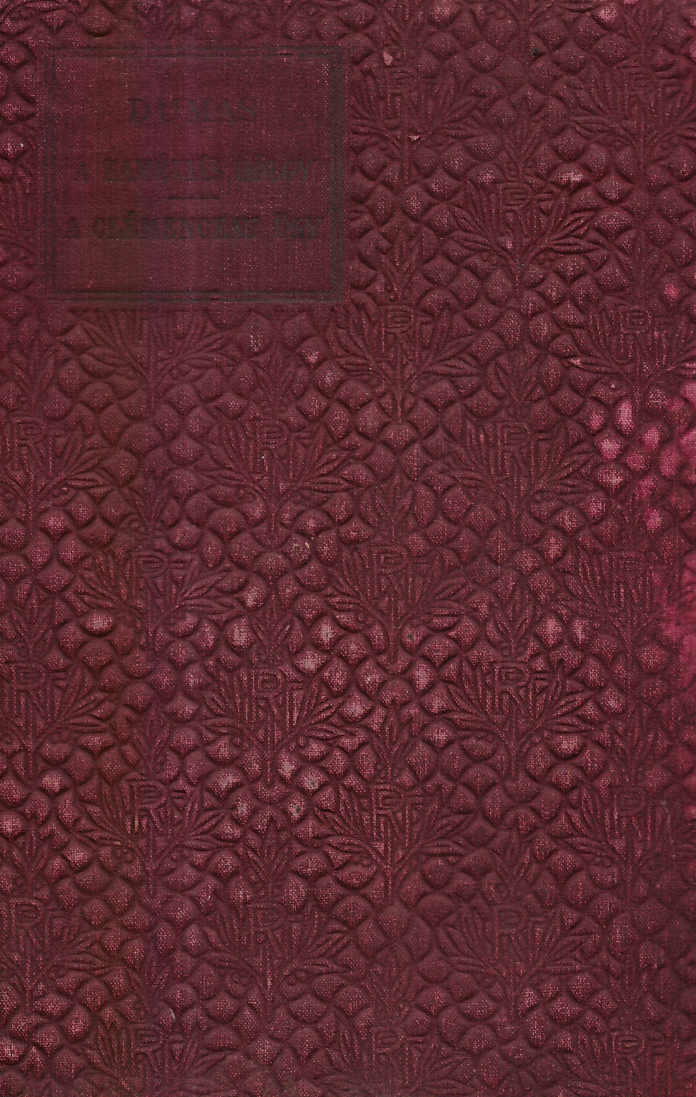 Alexandre Dumas (1824-1895): A kaméliás hölgy (Klasszikus Regénytár-sorozat, 1907)